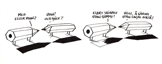 Seriestripp tecknad av Ulf Frödin, publicerad i Aftonbladet 1982.